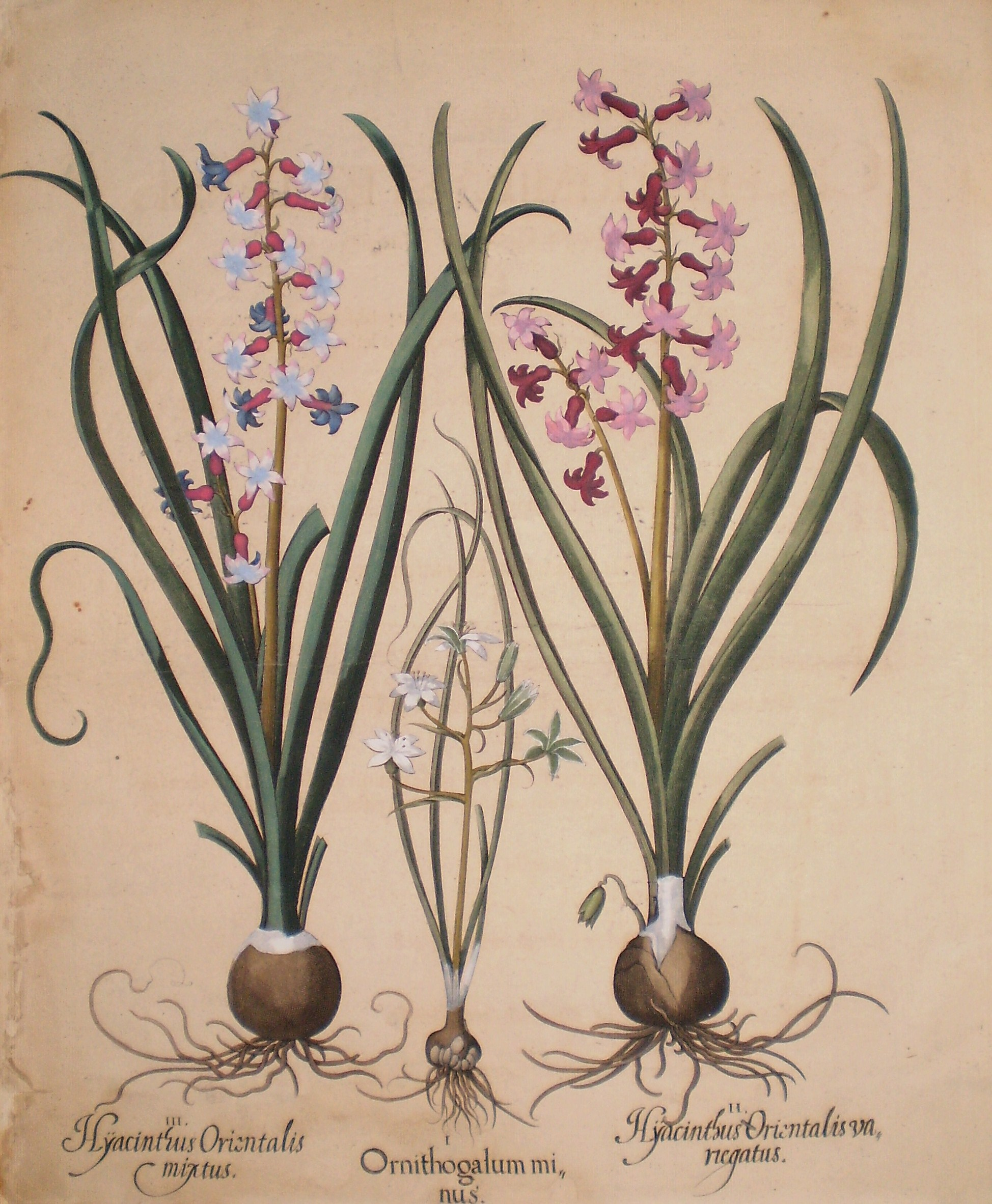 Disegno delle specie Hyacinthus orientalis mixtus, Ornithogalum minus e Hyacinthus orientalis veriegatus provenienti dell'edizione del 1613 a Norimberga del Celeberrimi Eystettensis. Dall'archivio della Libreria antiquaria Bourlot di Marco Birocco, Torino